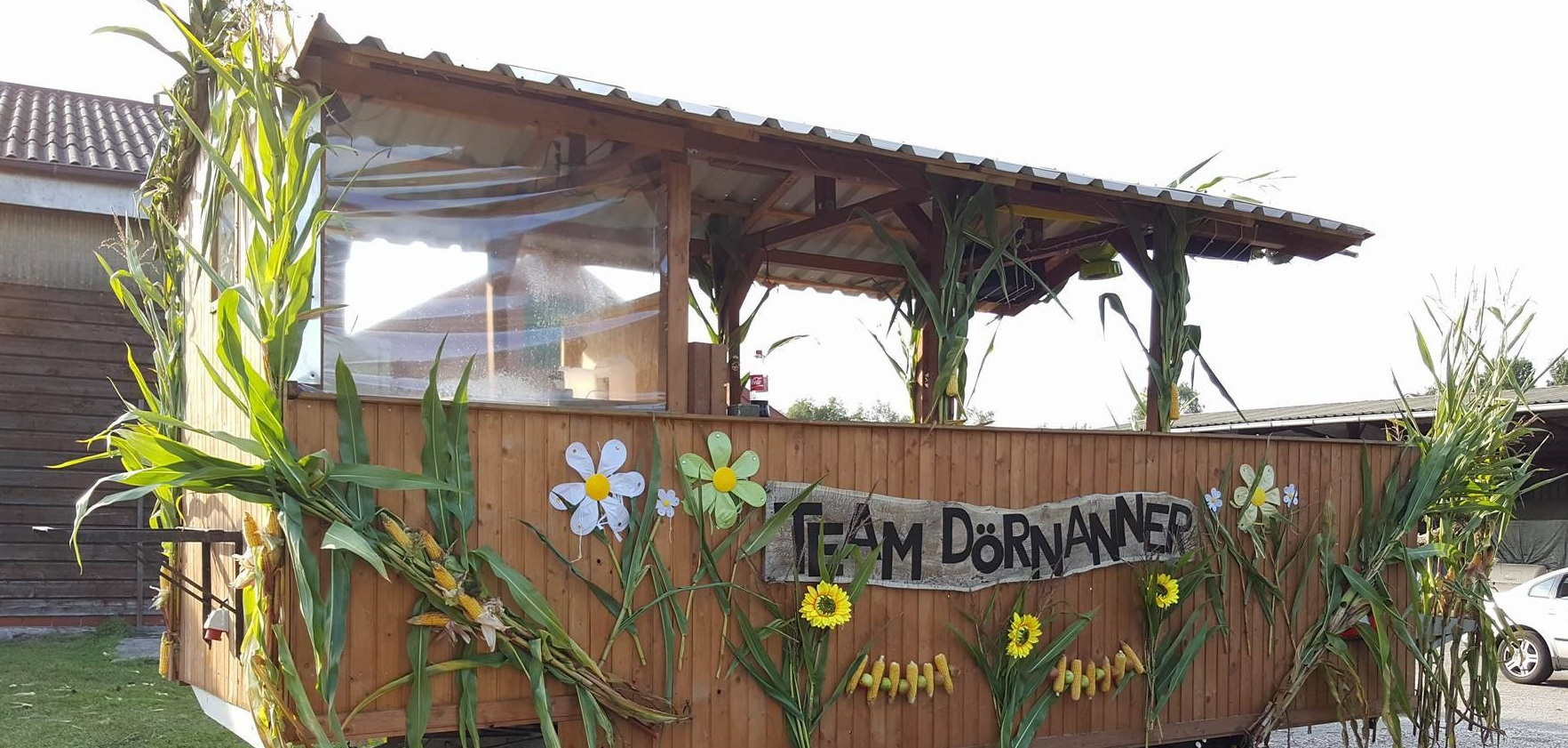 Hier sehen sie einen typischen Festwagen der für einen Erntedankumzug geschmückt ist